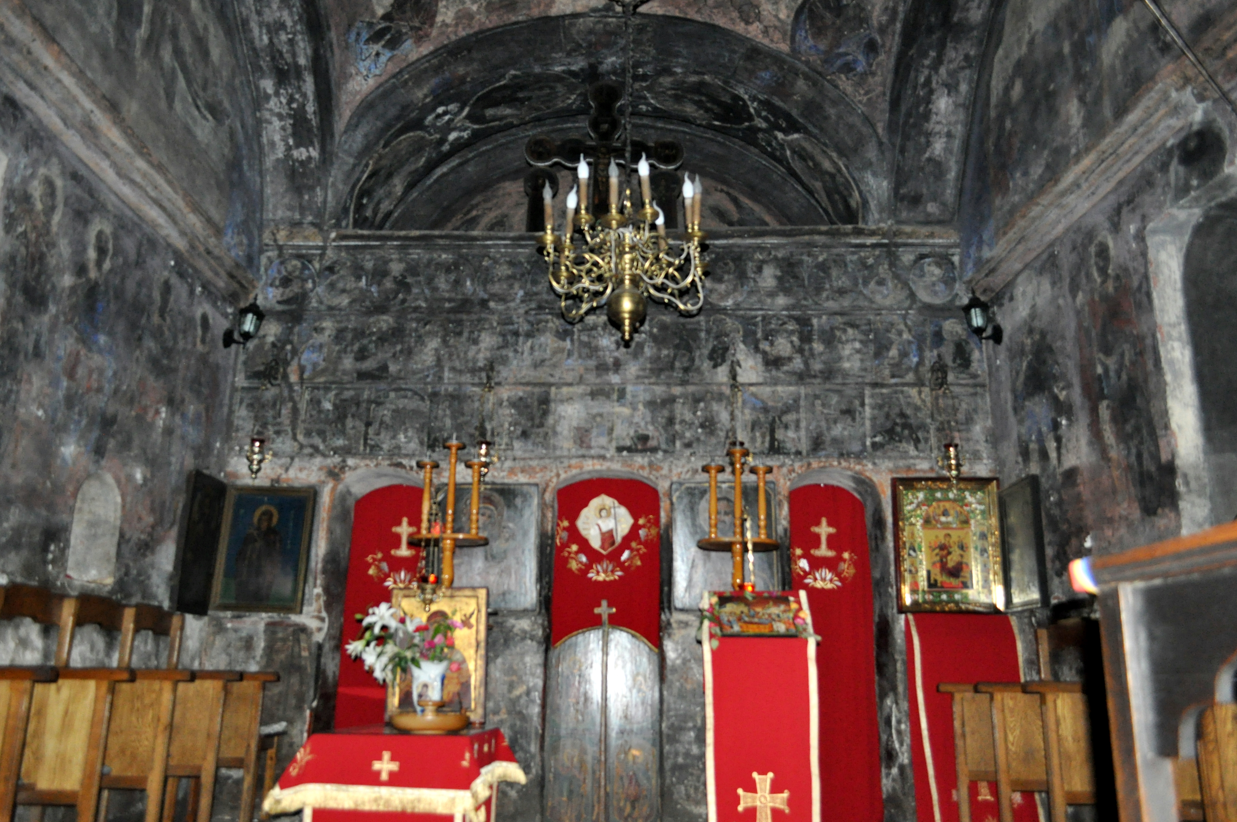 Biserica "Adormirea Maicii Domnului" - Olari, municipiul Curtea de Argeș, str. Cuza Vodă 134